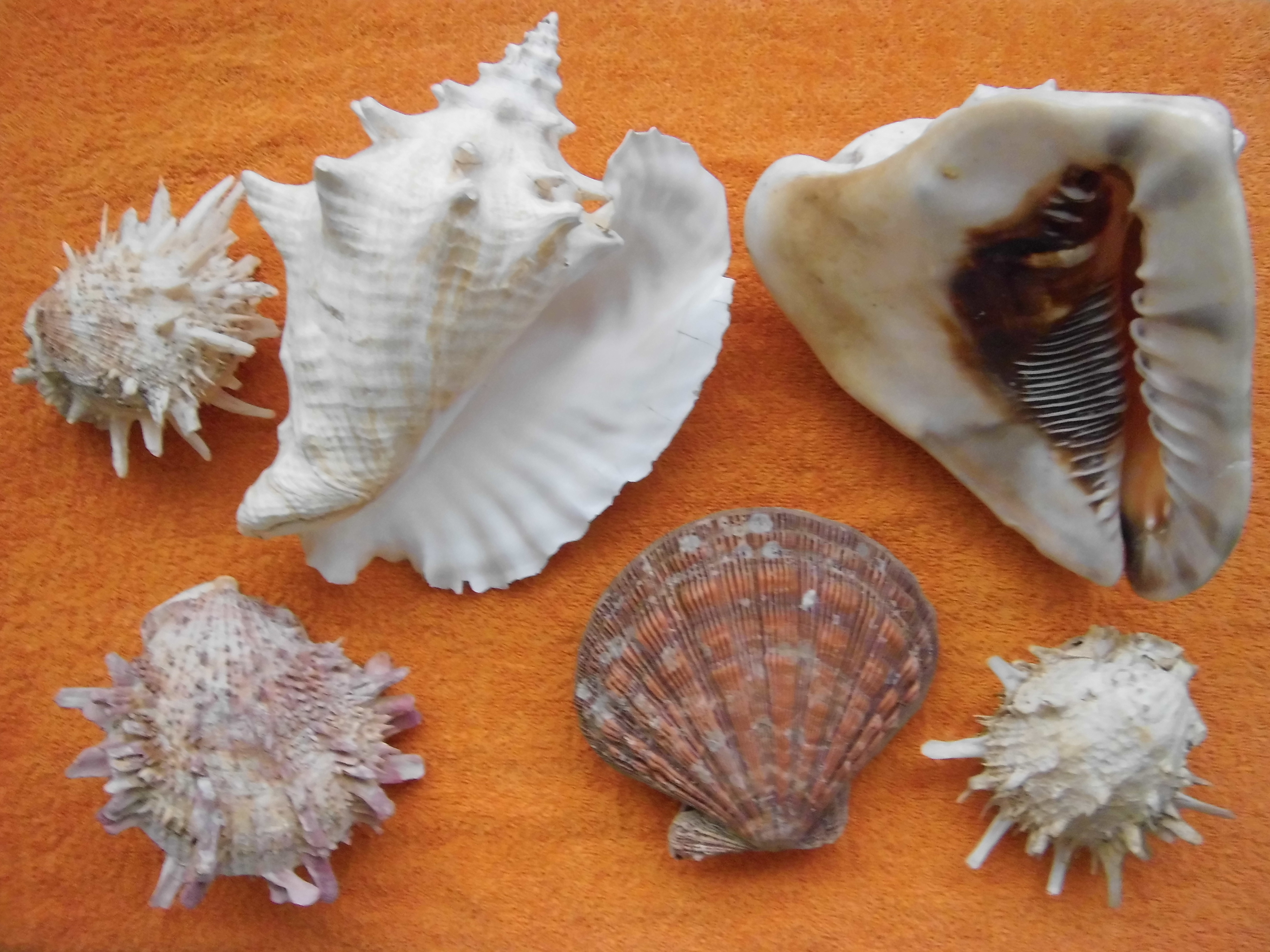 Moluscos varios de Venezuela 2013 000 colectados en las Dependencias Federales - Venezuela En la imagen se observan las siguientes especies: Gastropodos 1 concha de Lobatus gigas (Linnaeus, 1758) 1 concha de Cassis tuberosa (Linnaeus, 1758) Bivalvos 1 concha de Nodipecten nodosus (Linnaeus, 1758) 3 conchas de Spondylus americanus Hermann, 1781